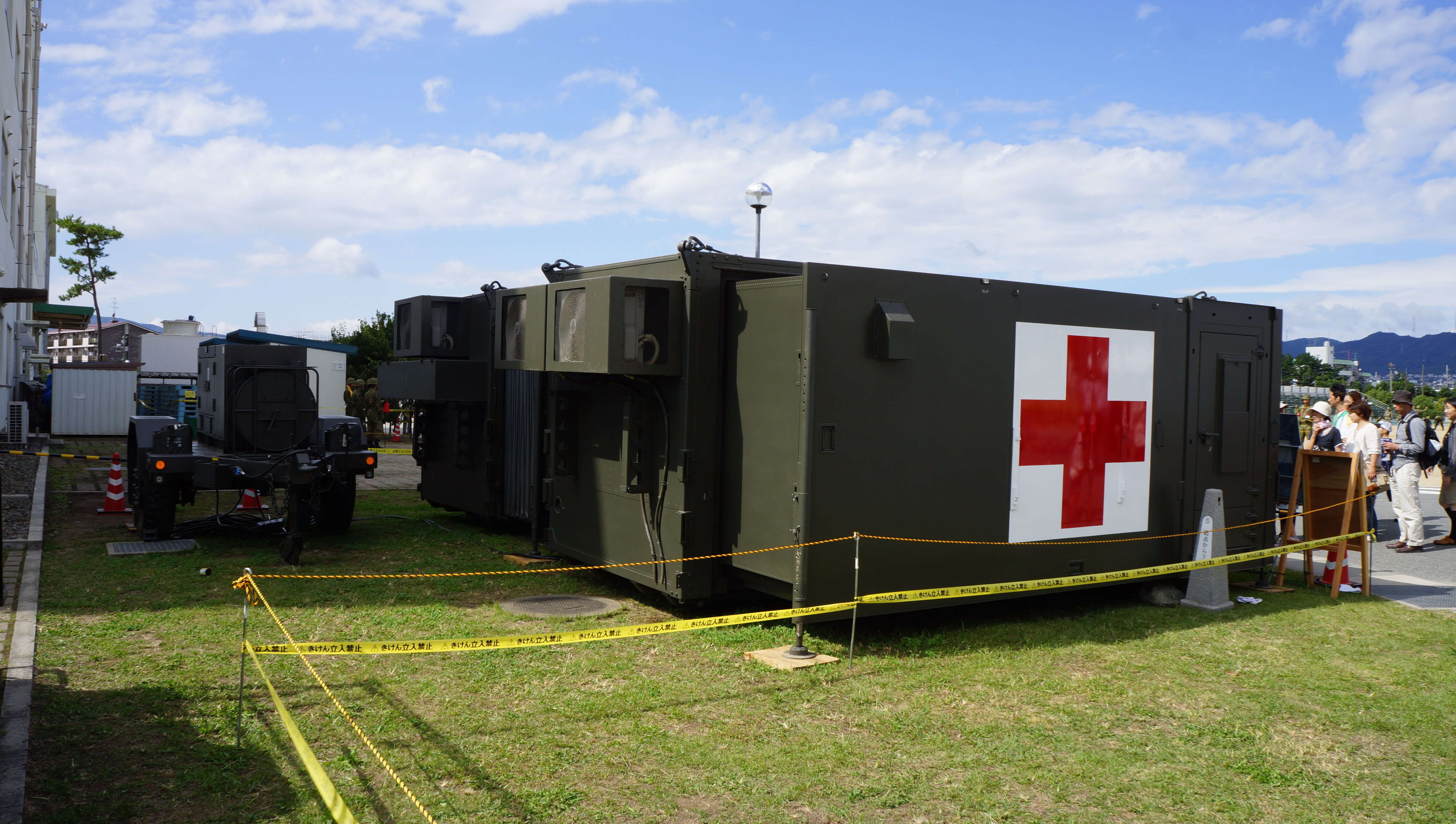 野外手術システム 手術ユニット側から 12年10月7日 伊丹駐屯地にて